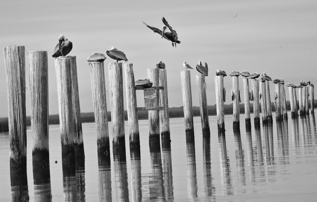 Pelicans on piers, Cocodrie, Louisiana